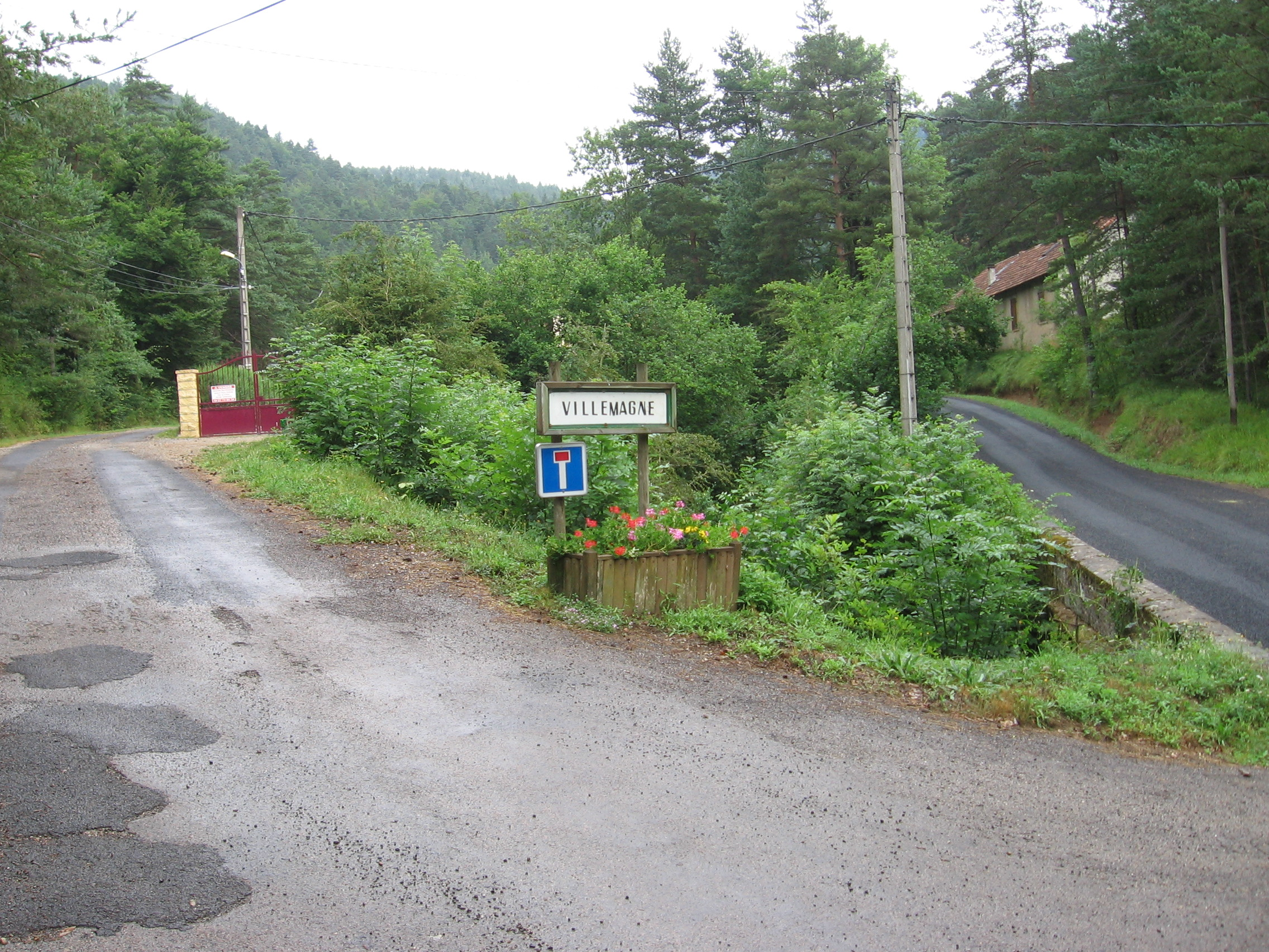 Hameau de Villemagne, commune de Saint Sauveur Camprieu